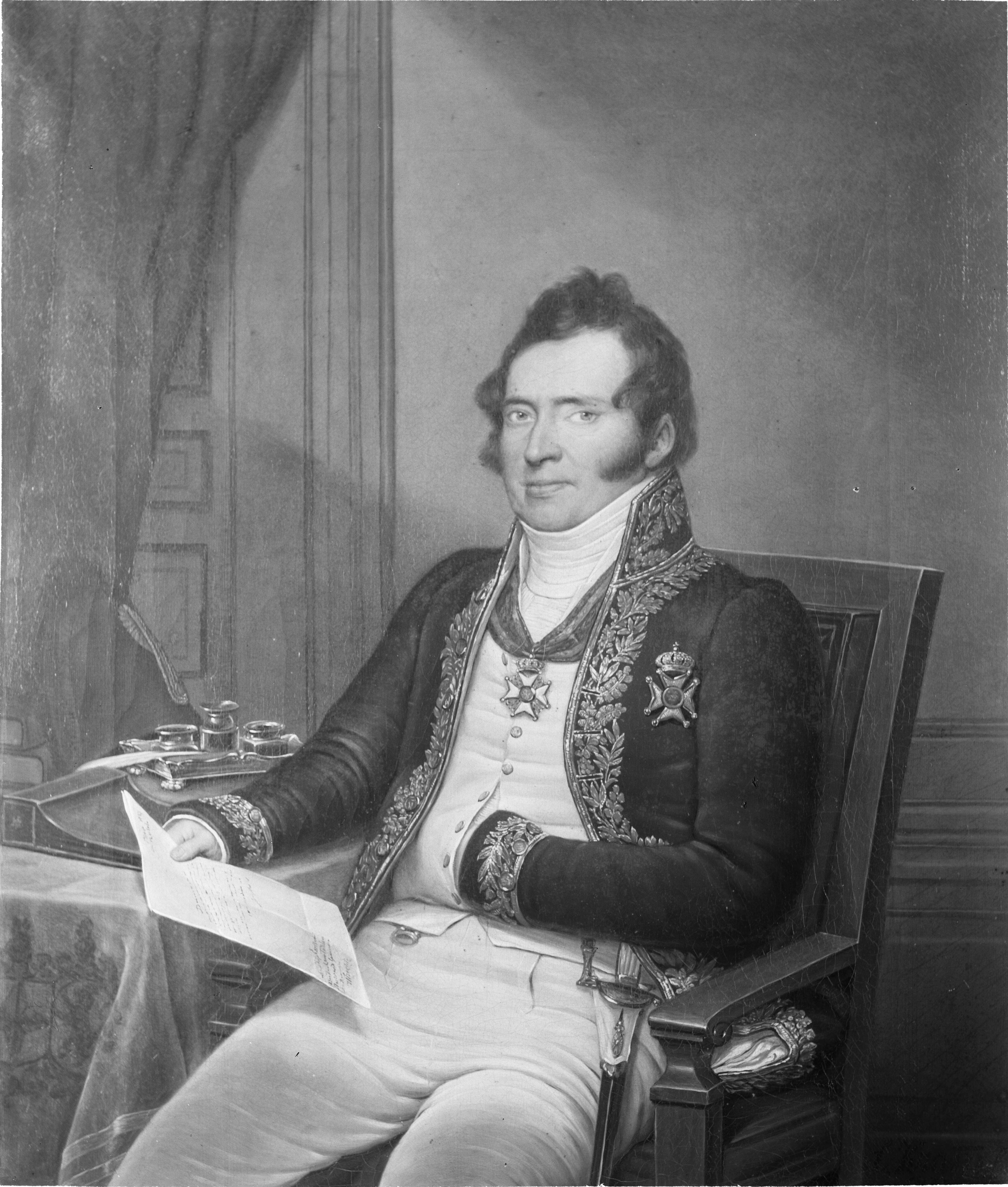 Lodewijk van Toulon (1767-1840), burgemeester van Gouda, gouverneur van Utrecht en voorzitter van de Tweede Kamer